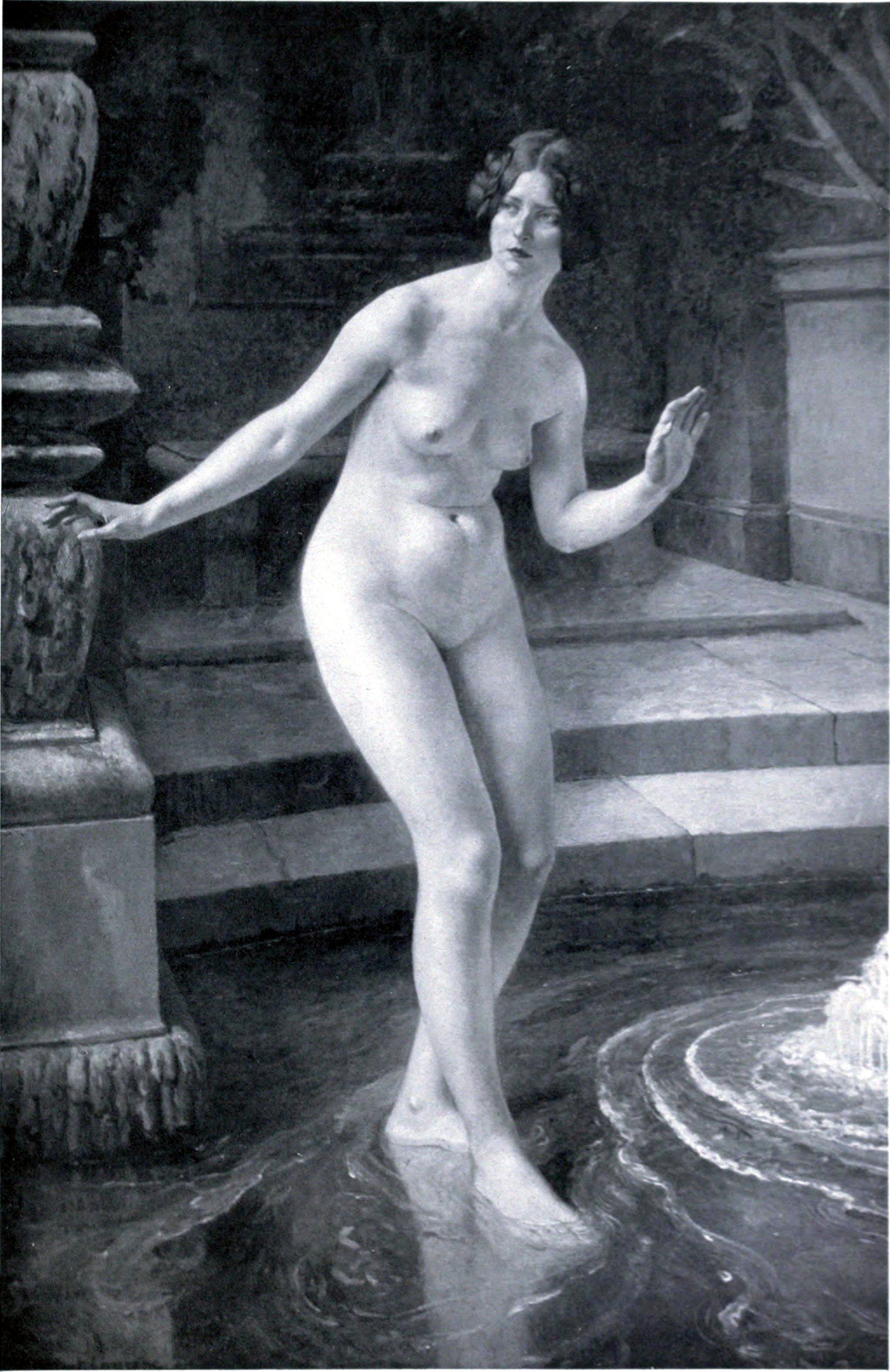 Suzanne